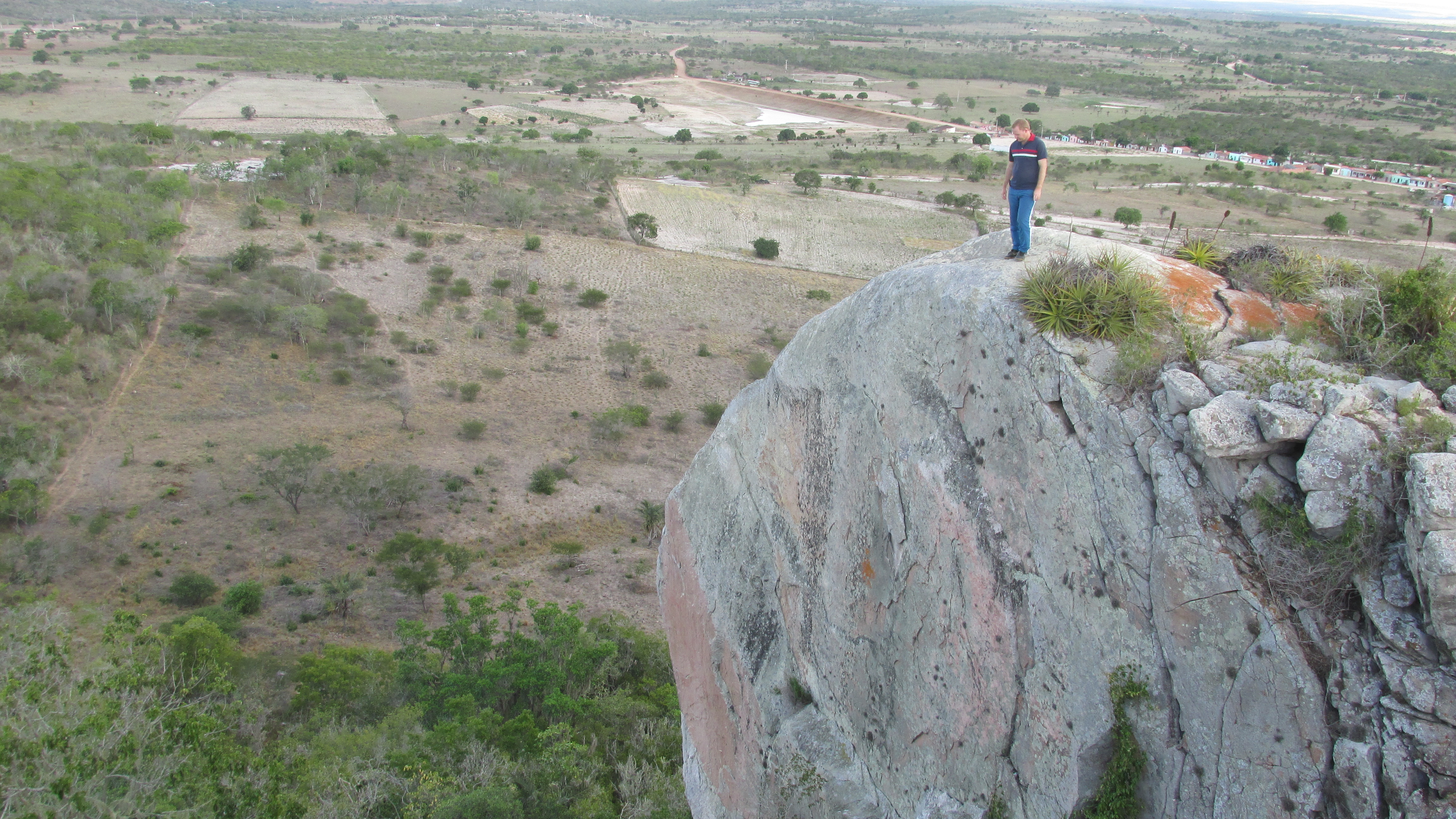 Um dos picos da montanha de pedras que deu nome ao Distrito de Pedra Alta.